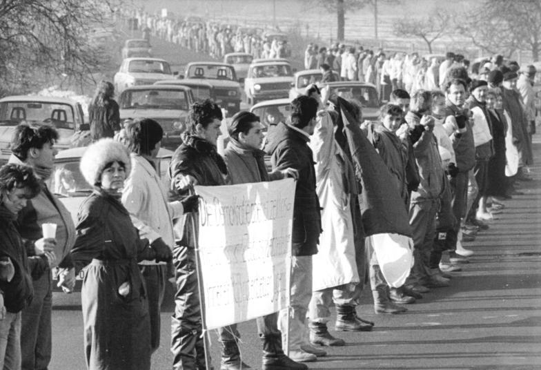 ADN-ZB Häßler 3.12.89 Dresden: Menschenkette Am Ortsausgang von Dresden standen die Bürger in der Menschenkette entlang der Fernverkehrsstraße F 6.